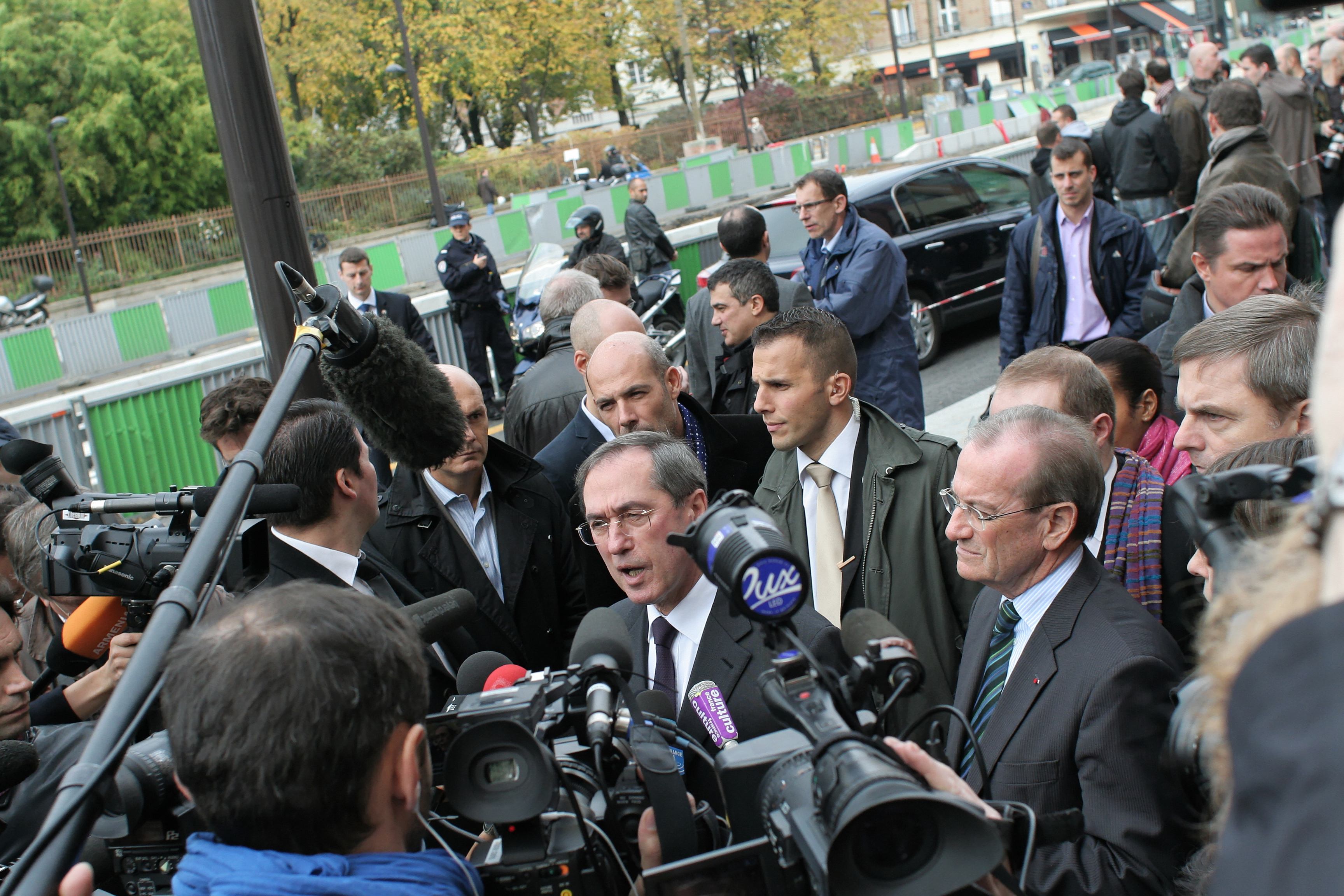 Incendie des locaux de Charlie Hebdo (62 boulevard Davout, Paris) le mercredi 2 novembre 2011. Point-presse de Claude Guéant